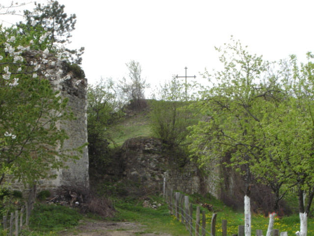 Srebrenica Stari Grad